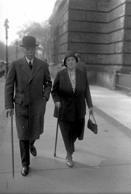 Die Wahl des Reichstagspräsidenten in Berlin! Aufnahmen prominenter Parlamentarier auf dem Wege zum Reichstag zur Wahl des Reichstagspräsidenten! General a.D. von Seeckt mit seiner Gattin begibt sich in den Reichstag.